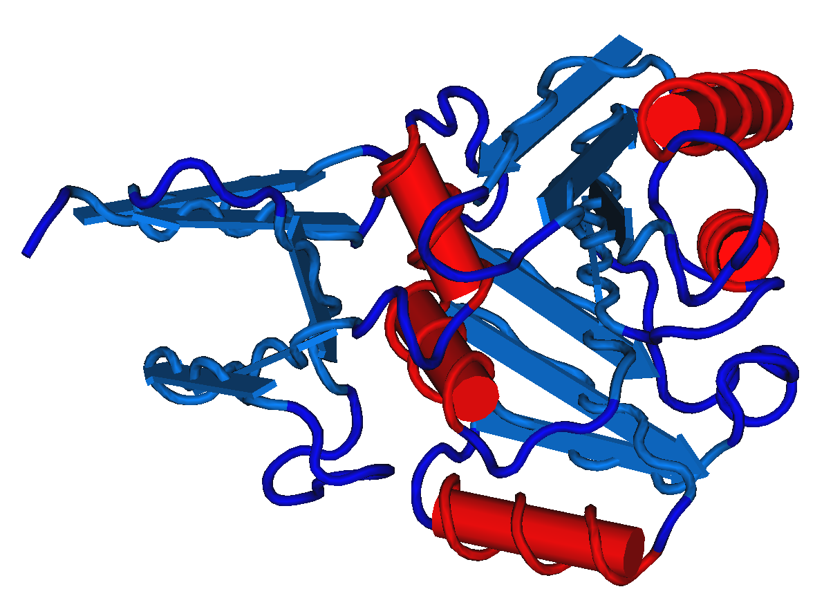 1FBN_Fibrillarin